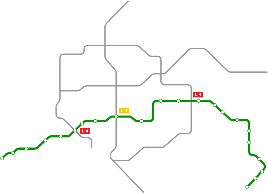 Línea 1 dentro de la red de Metro de Sevilla.